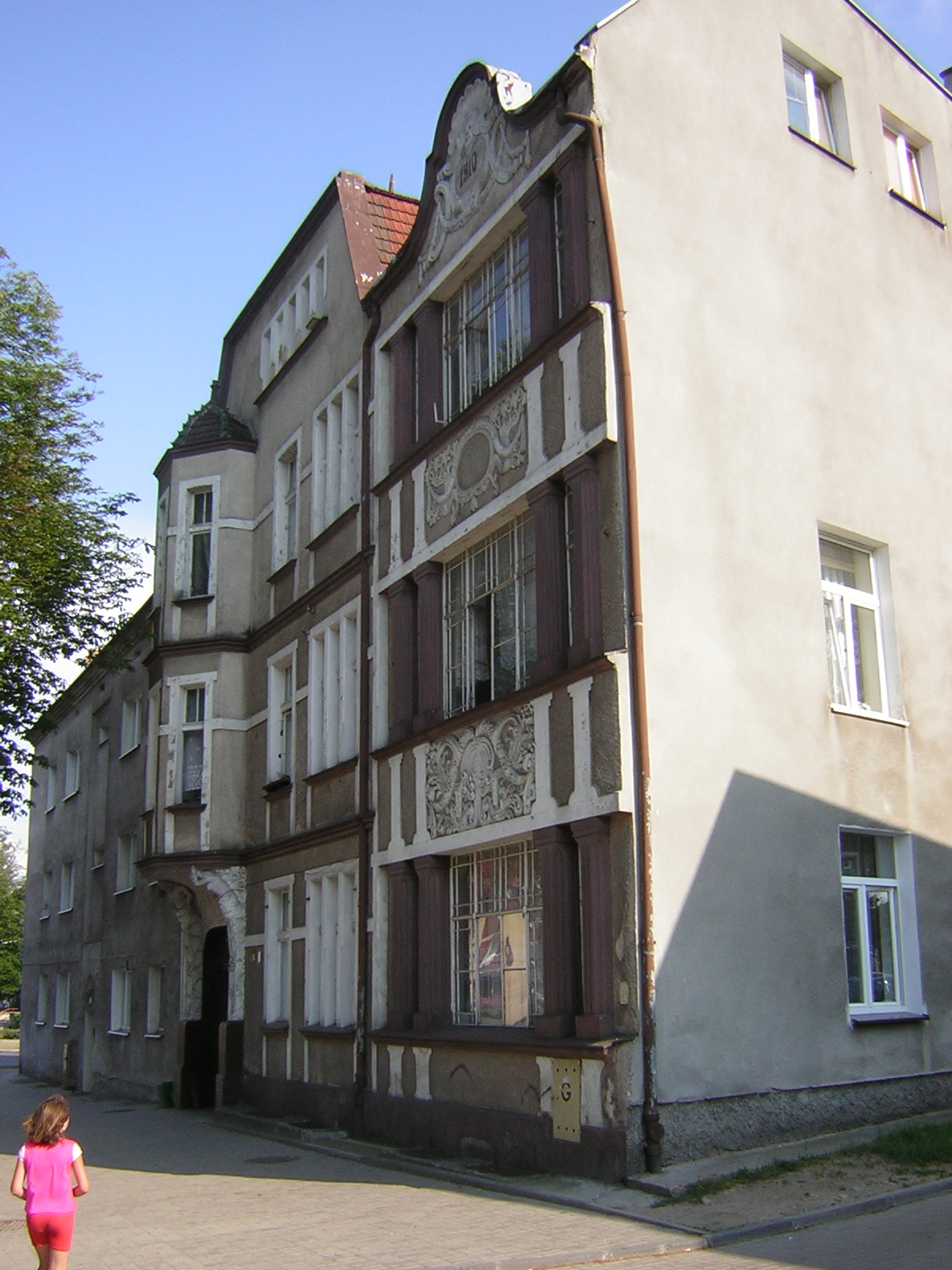 Kamienica w Iławie z 1910 roku (zabytek nr rejestr. 1540)